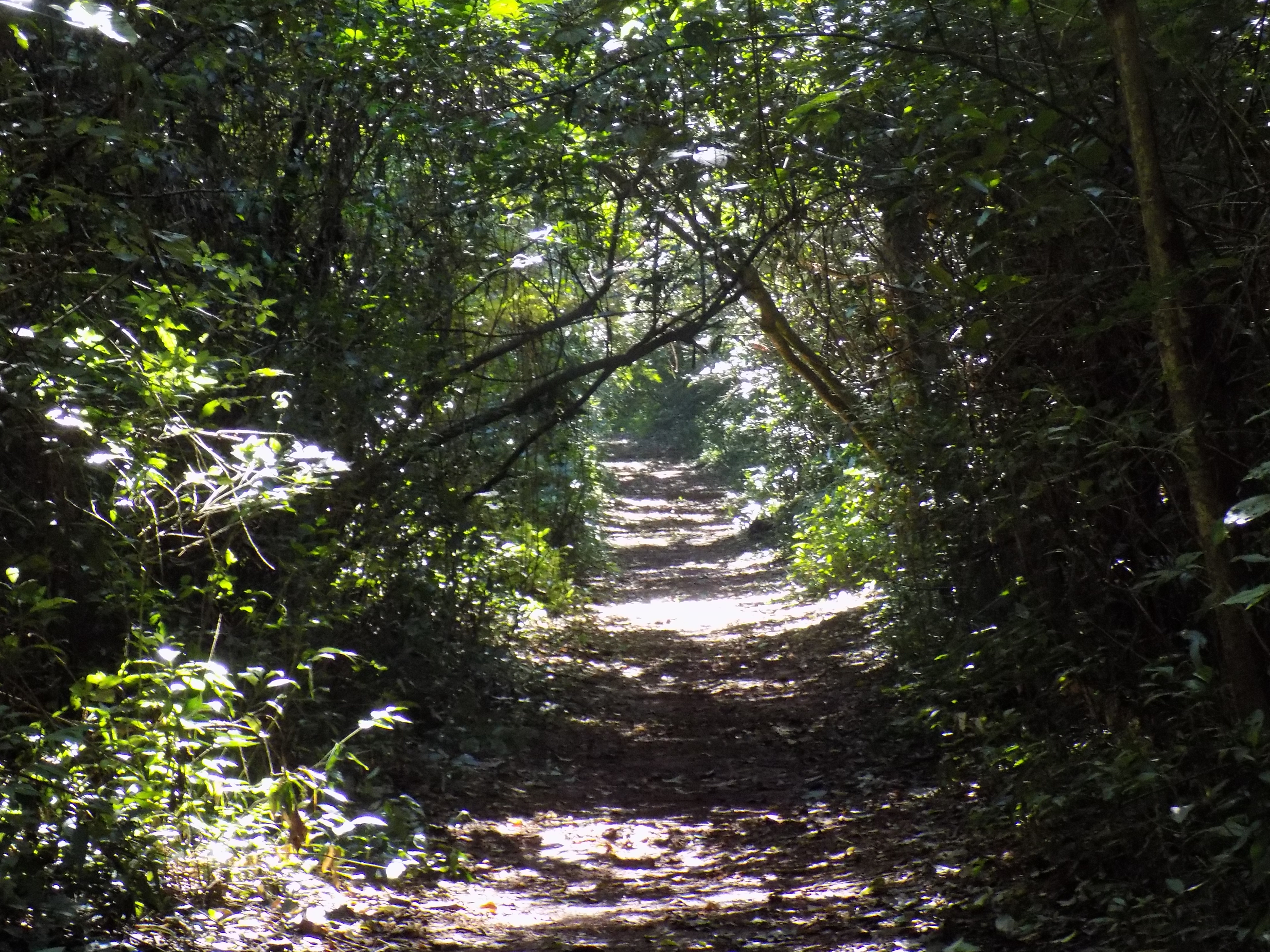 O Horto Florestal fica localizado na cidade de Ibiporã, no norte do Paraná. Com 770 mil m2 esse parque, abriga várias espécies diferentes de animais, desde borboletas, pássaros, cobras (Jararaca, coral, Cascavel) e aranhas, até Cães do Mato, Quatis, Jacus e um ou outro cão abandonado, que é cuidado pelos funcionários do horto. É um lugar amplo, com trilhas largas, diversas espécies nativas da mata atlântica. Aberto ao público de segunda a sexta, por motivo de conflitos políticos, não está mais aberto aos fins de semana, horário de funcionamento das 8:30 hs às 18:00 hs.